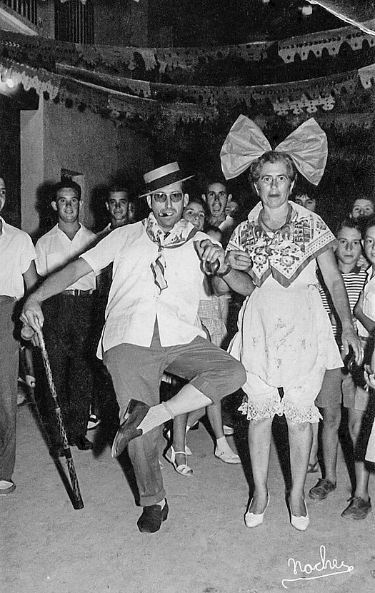 Projecte: recuperació de l'obra fotogràfica d'En Vicente Nácher Vendrell, les fotografies familiars i el seu Arxiu. Treball conjunt de l'Arxiu Fotogràfic Familiar Nácher (Algemesí) i de l'Arxiu Ismael Latorre Mendoza (Alginet). Drets de publicació: Concessió de drets de publicació a Wikimedia Commons dels fills i hereus legals de l'Arxiu Fotogràfic Familiar Nácher, Vicente Ramon Nácher Sánchez i María Nieves Nácher Sánchez, amb una llicència Creative Commons-BY-SA 3.0, a Vicenç Salvador Torres Guerola i a l'Arxiu Ismael Latorre Mendoza. Data de les autoritzacions: 25-09-2018, en Cullera i Carcaixent. Dades de la fotografia: Danses de Guadassuar, 1960. Dades del fotògraf Vicente Nácher Vendrell: Naixement: 3 de febrer de 1924, a Algemesí. Defunció: 16 de Maig de 1985, a València. Dècades importants dedicades a la fotografia: dels 50 als 80 (fins a la seua mort). S'ha publicat aquesta imatge a: Tus Noticias La Ribera, Comença el projecte de recuperació de l'obra fotogràfica d'En Vicente Nácher Vendrell (Algemesí), 29-11-2019 Tractament digital: Vicenç Salvador Torres Guerola